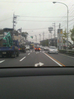 愛知県道464号南粕谷半田線の『植大駅西』という交差点を半田方面より撮影。